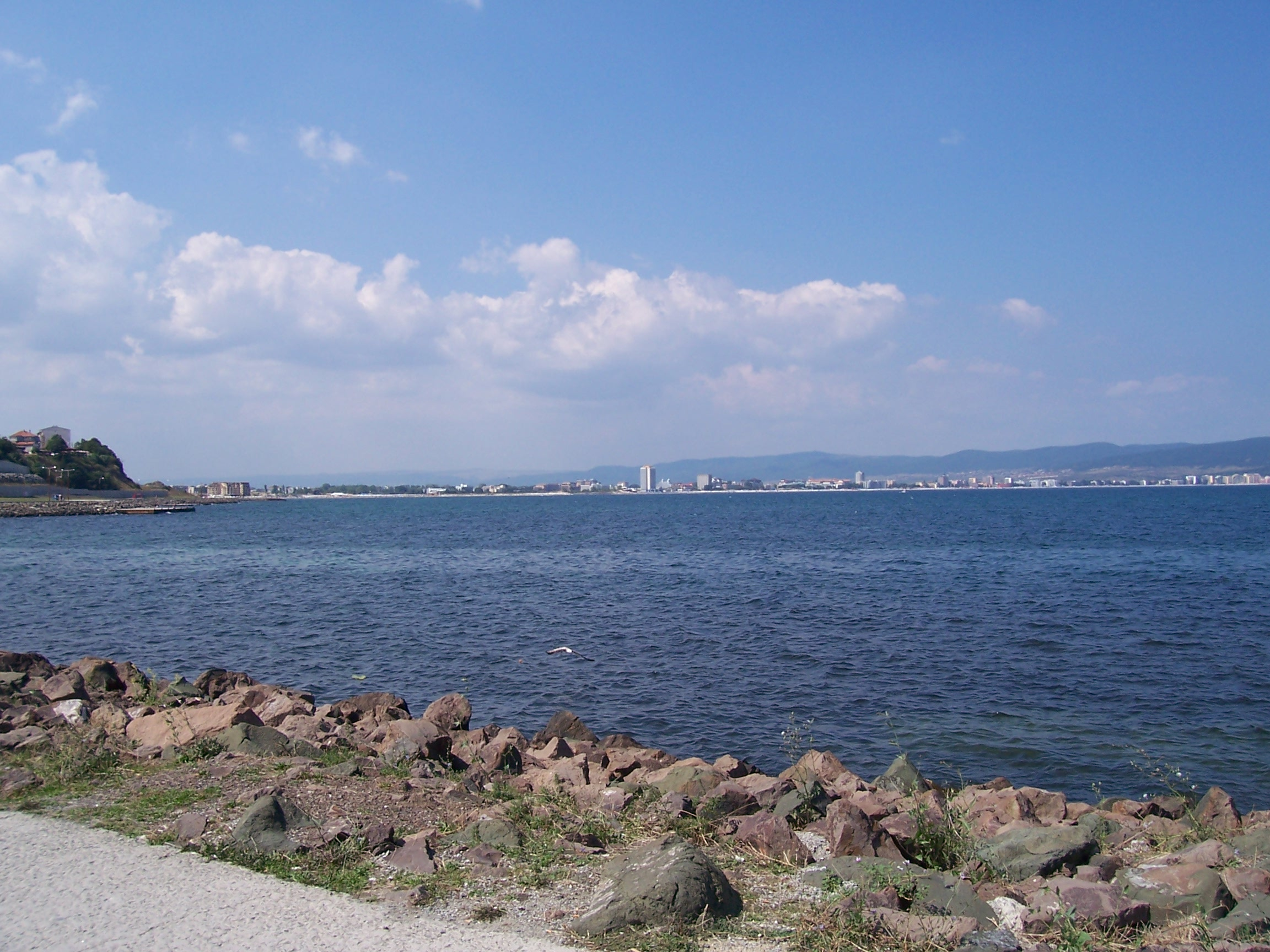 Słoneczny Brzeg- bułgarski kurort na wybrzeżu Morz Czarnego, ok.35 kilometrów na północ od Burgas